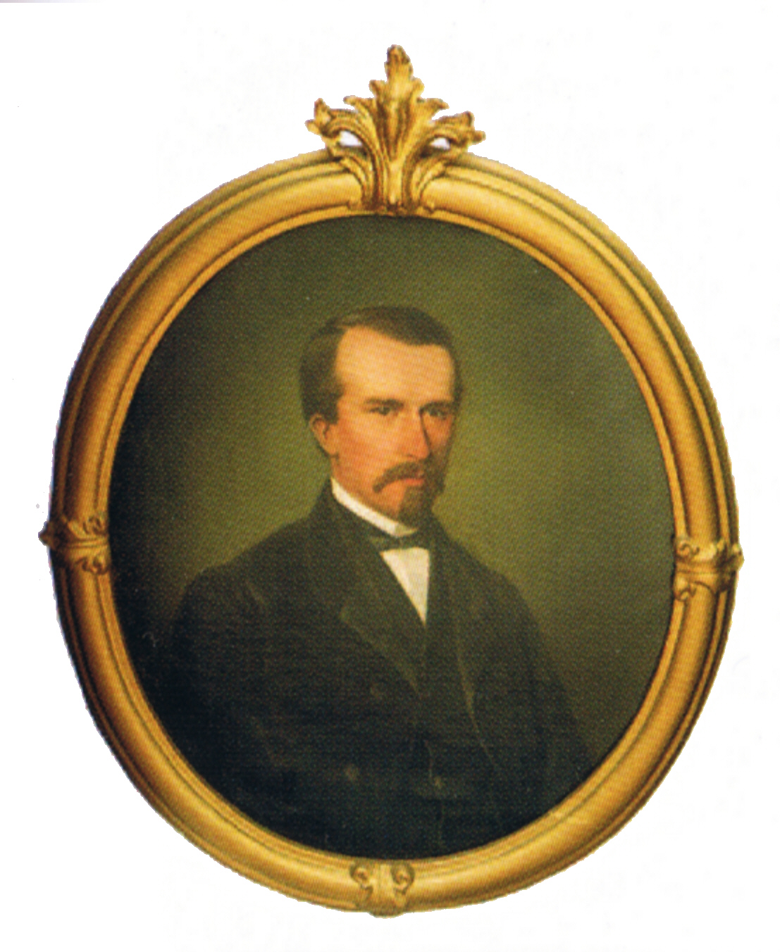 Christian Emil Heinrich Julius Graf zu Rantzau Schleswig-holsteinischer Standesherr und Politiker, Klosterprobst zu Uetersen